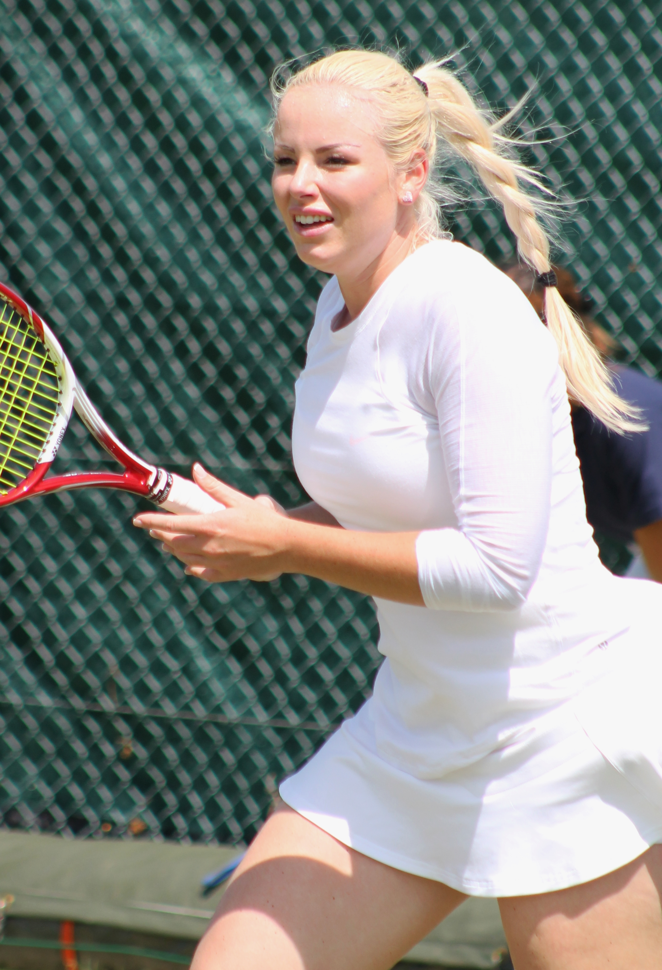 Majeric WMQ14 (10)